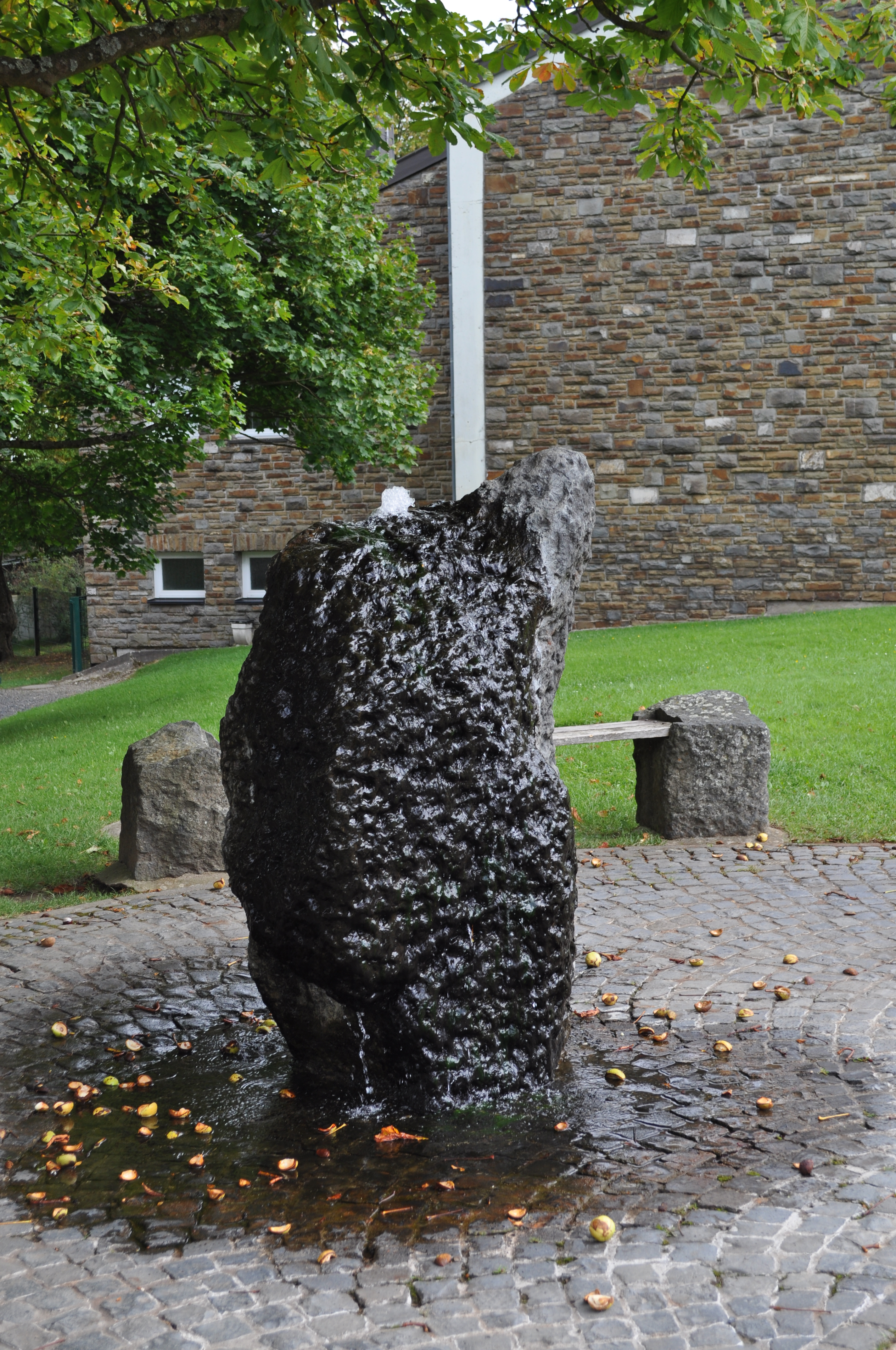 Brunnen hinter der Kirche in Krunkel